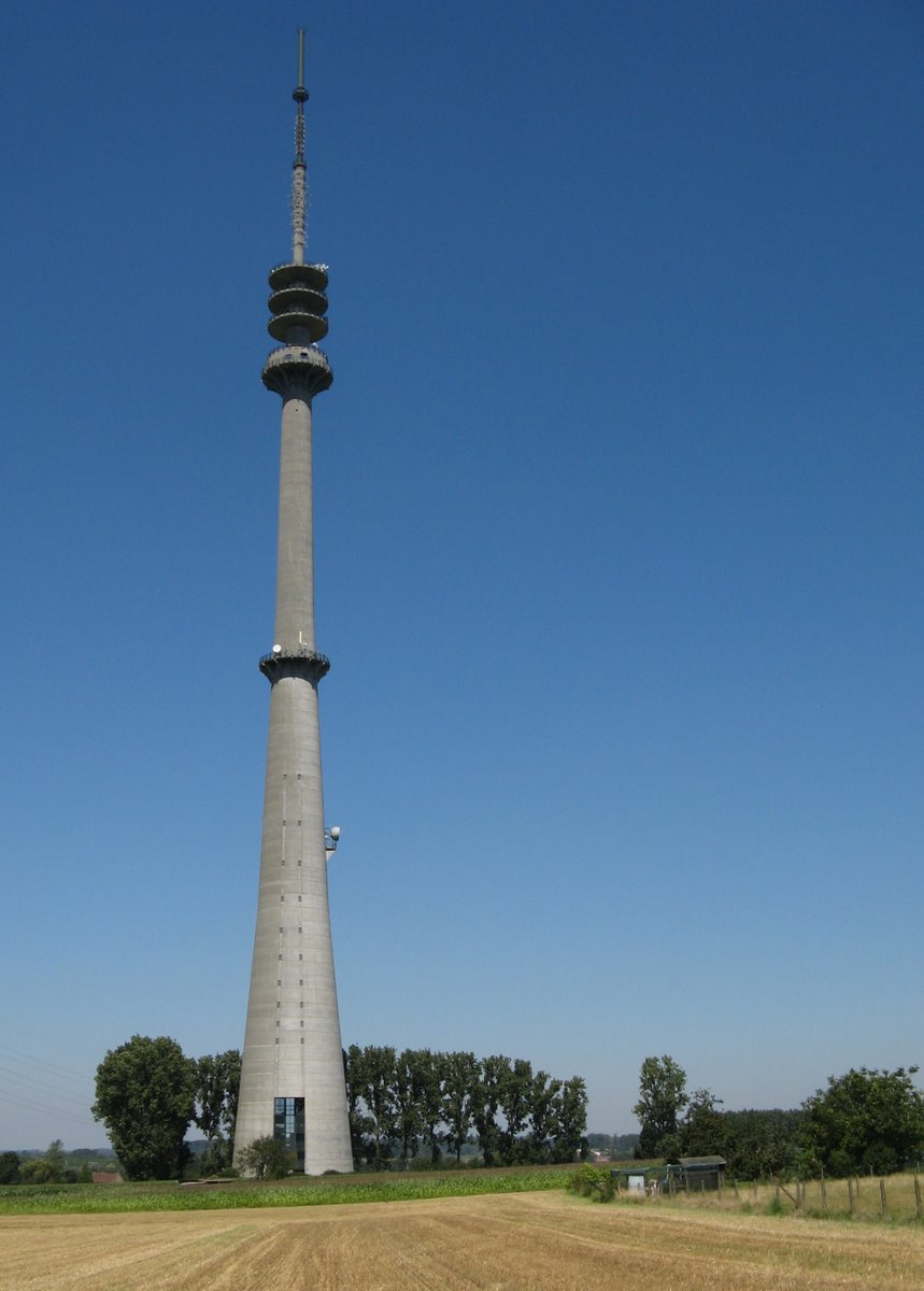 Norkring Toren, ex-VRT Toren, Sint-Pieters-Leeuw, Belgium